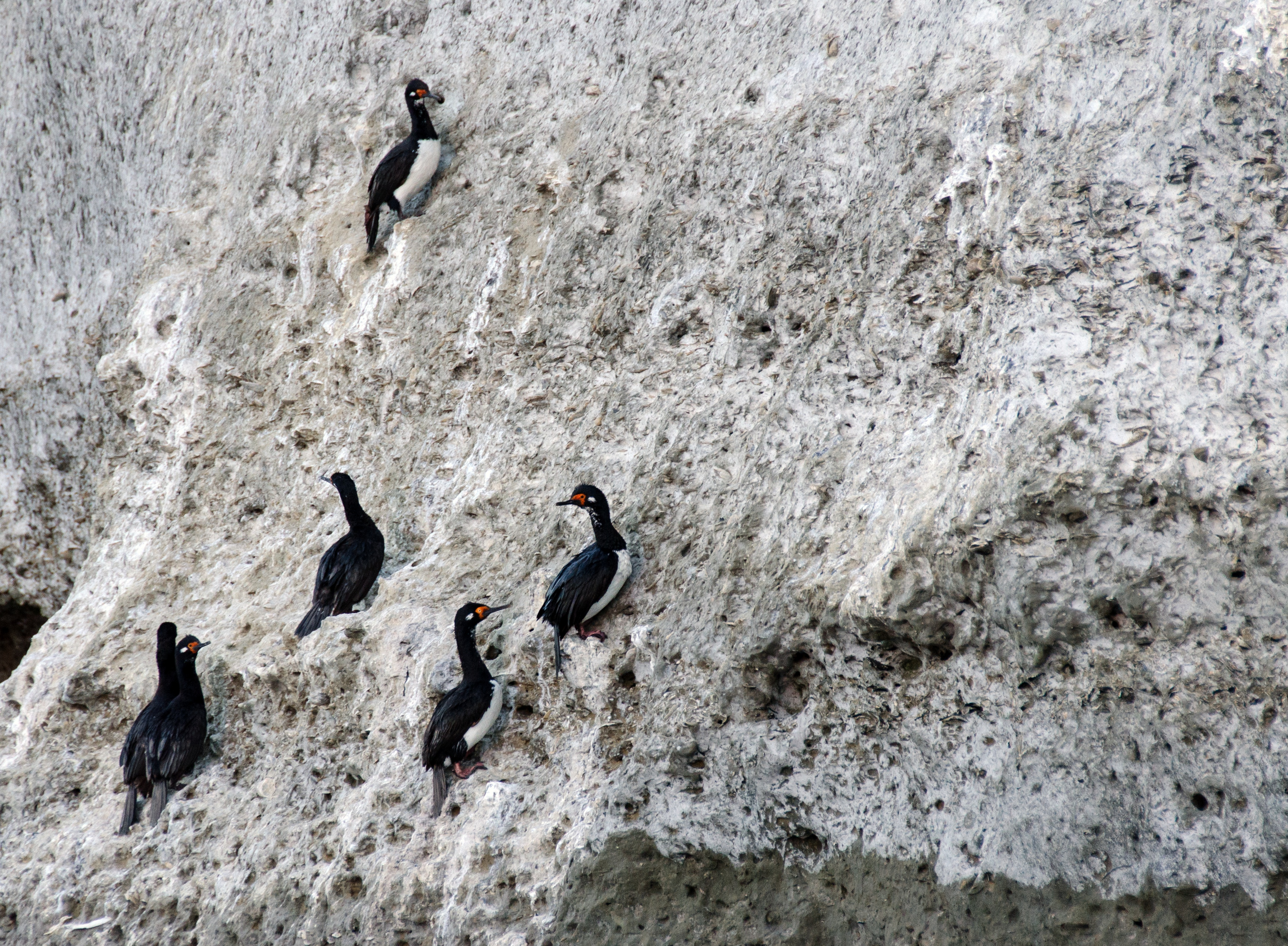 Phalacrocorax magellanicus o Cormoran Roquero en la costa de la Península de Valdés